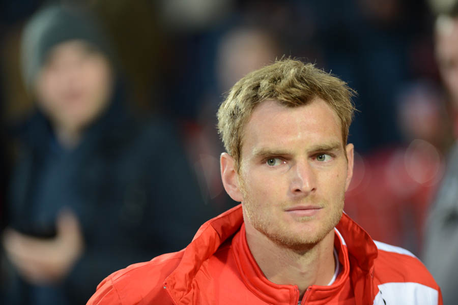 Christian Stuff vor Anpfiff